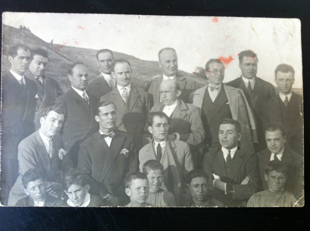 Яне Хаджиянев със съратници